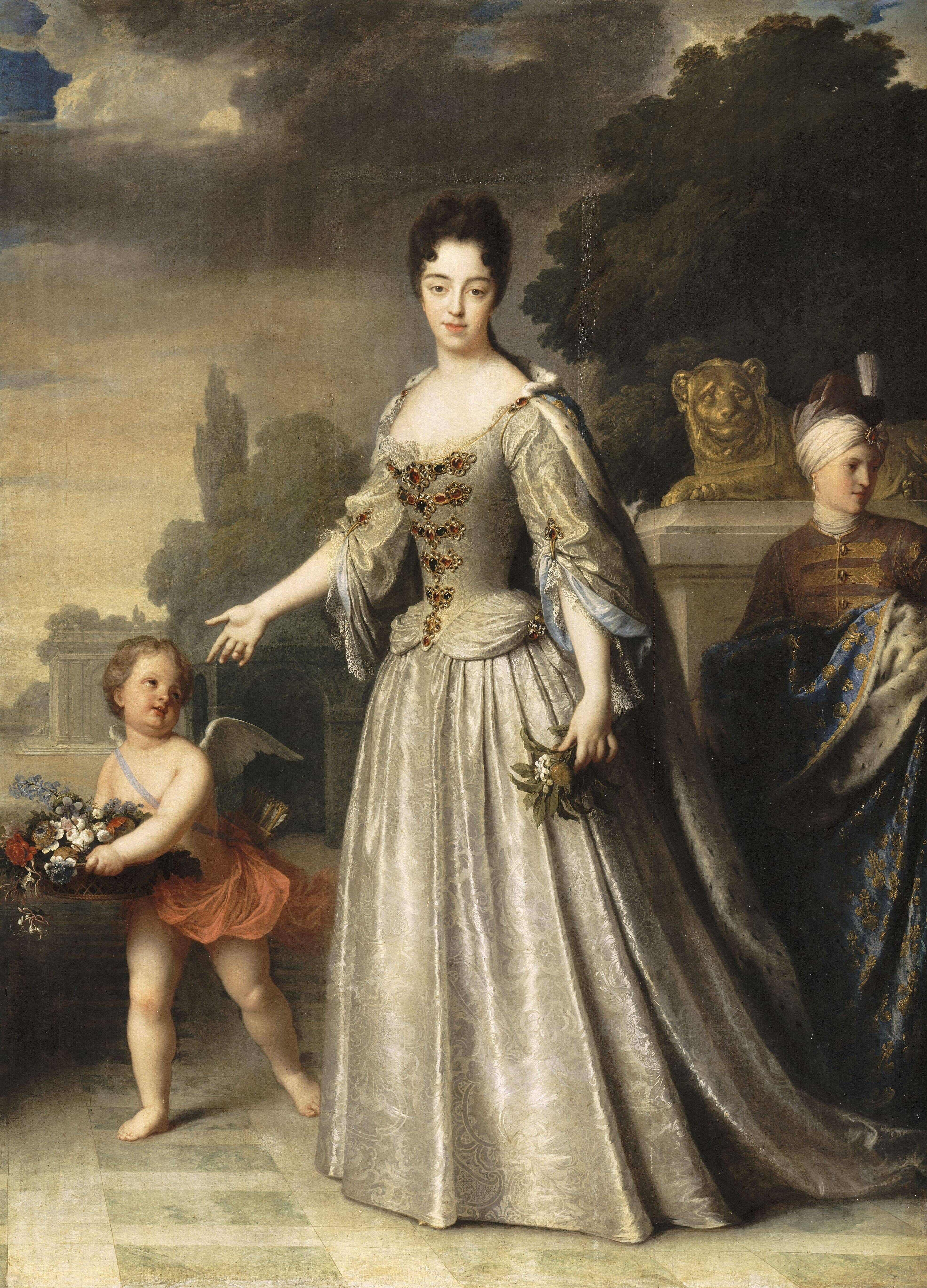 Maria Adelaide von Savoyen (1685-1712)